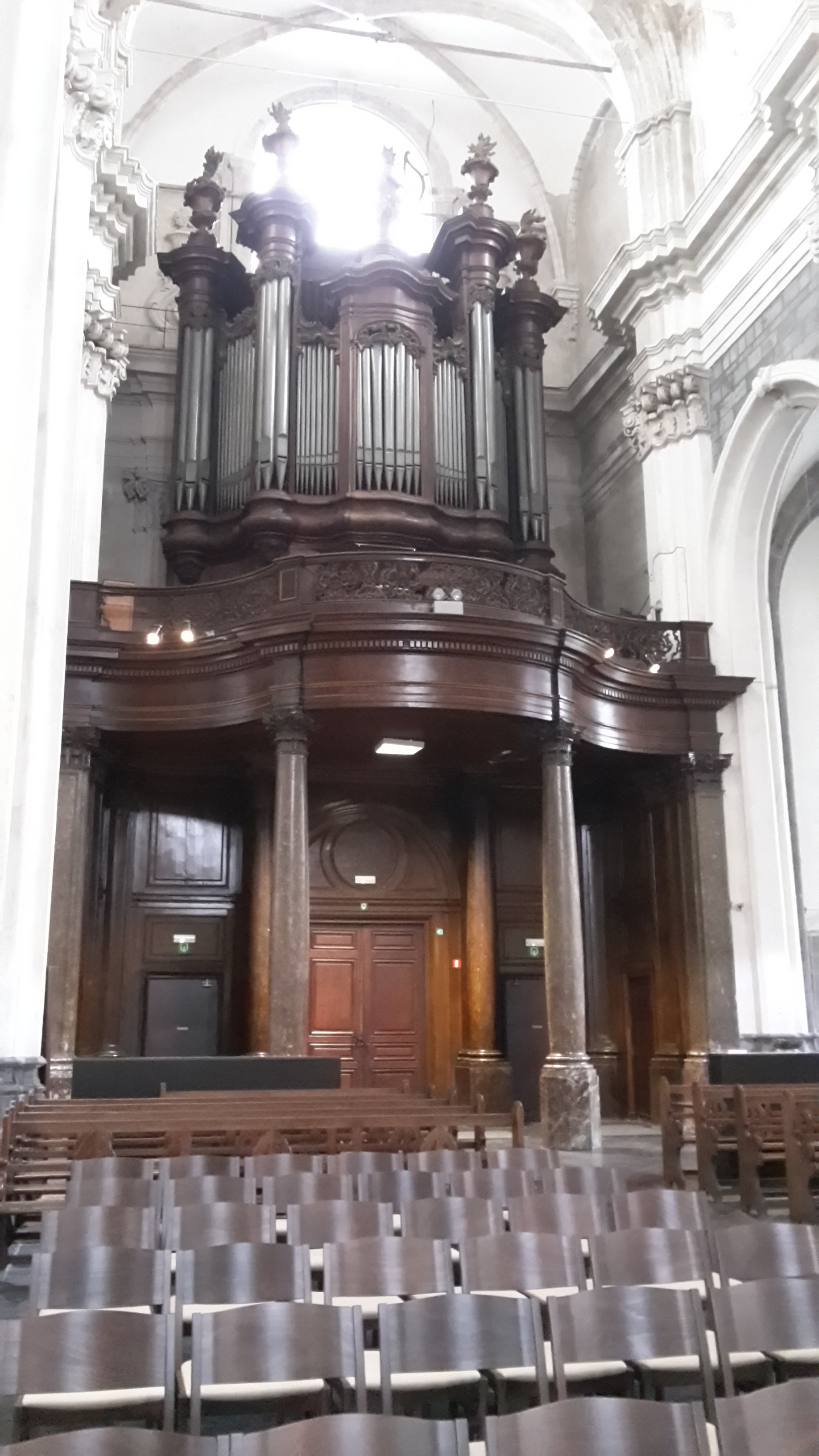 Grand orgue de l'église Sainte-Elisabeth de Mons (Belgique), reconstruit en 1849 par Joseph MERKLIN.